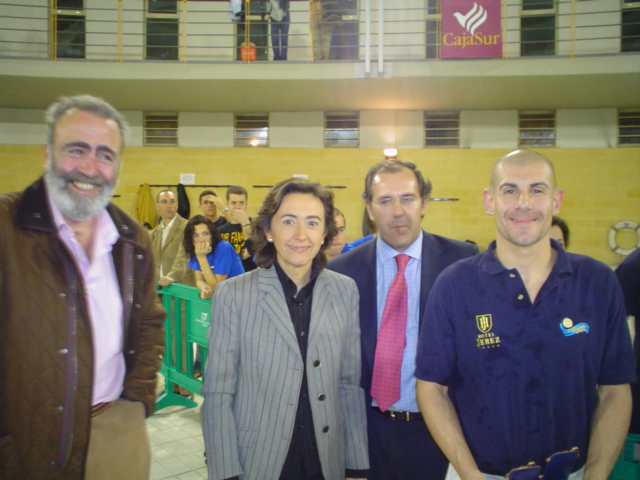 Rosa Aguilar en la apertura del primer torneo Open Master Cordoba 2016 el 18 de febrero en el palacio de los Deportes de Vista Alegre de Córdoba (España)